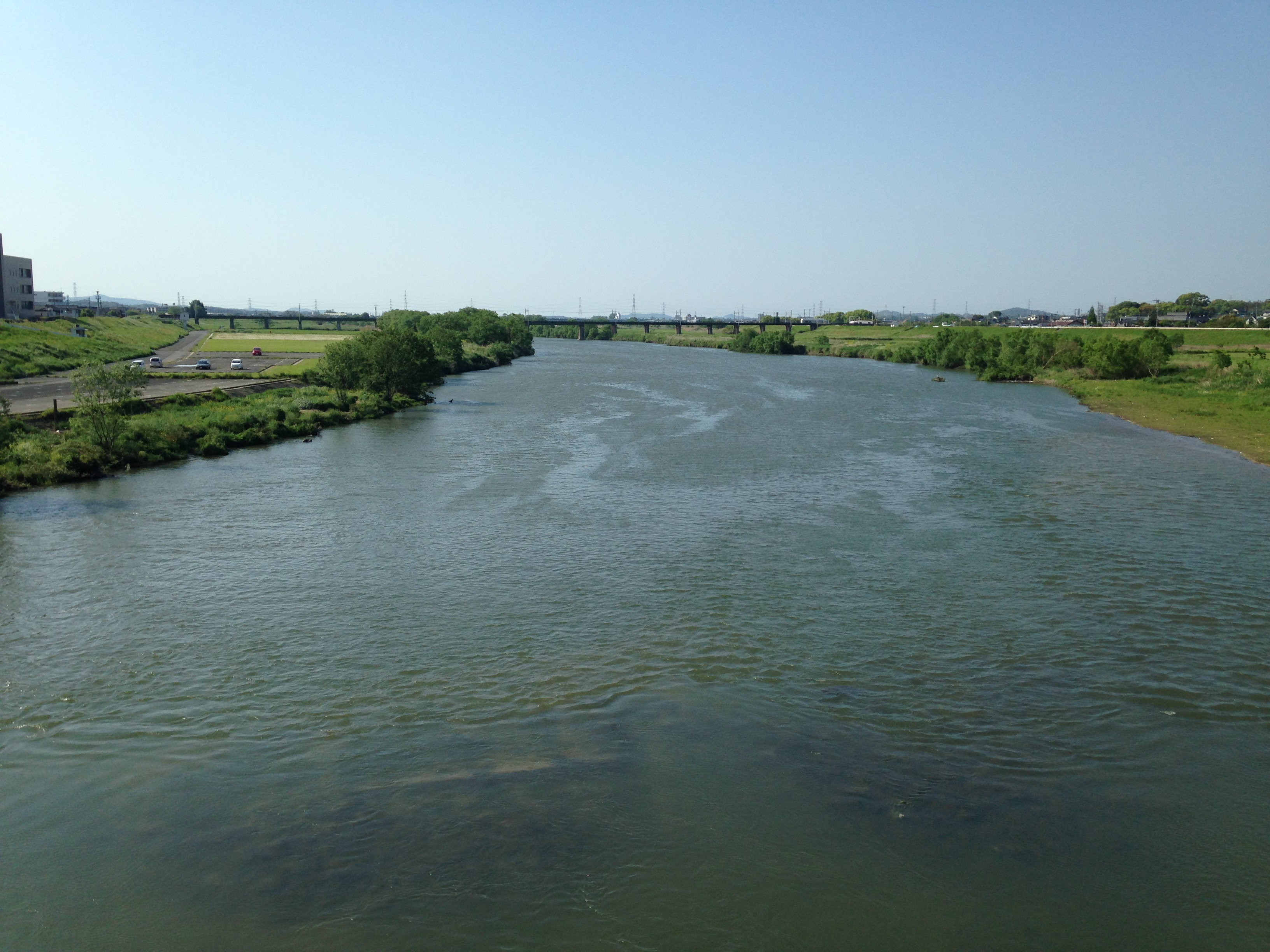 日の出大橋より望む遠賀川(下流側)